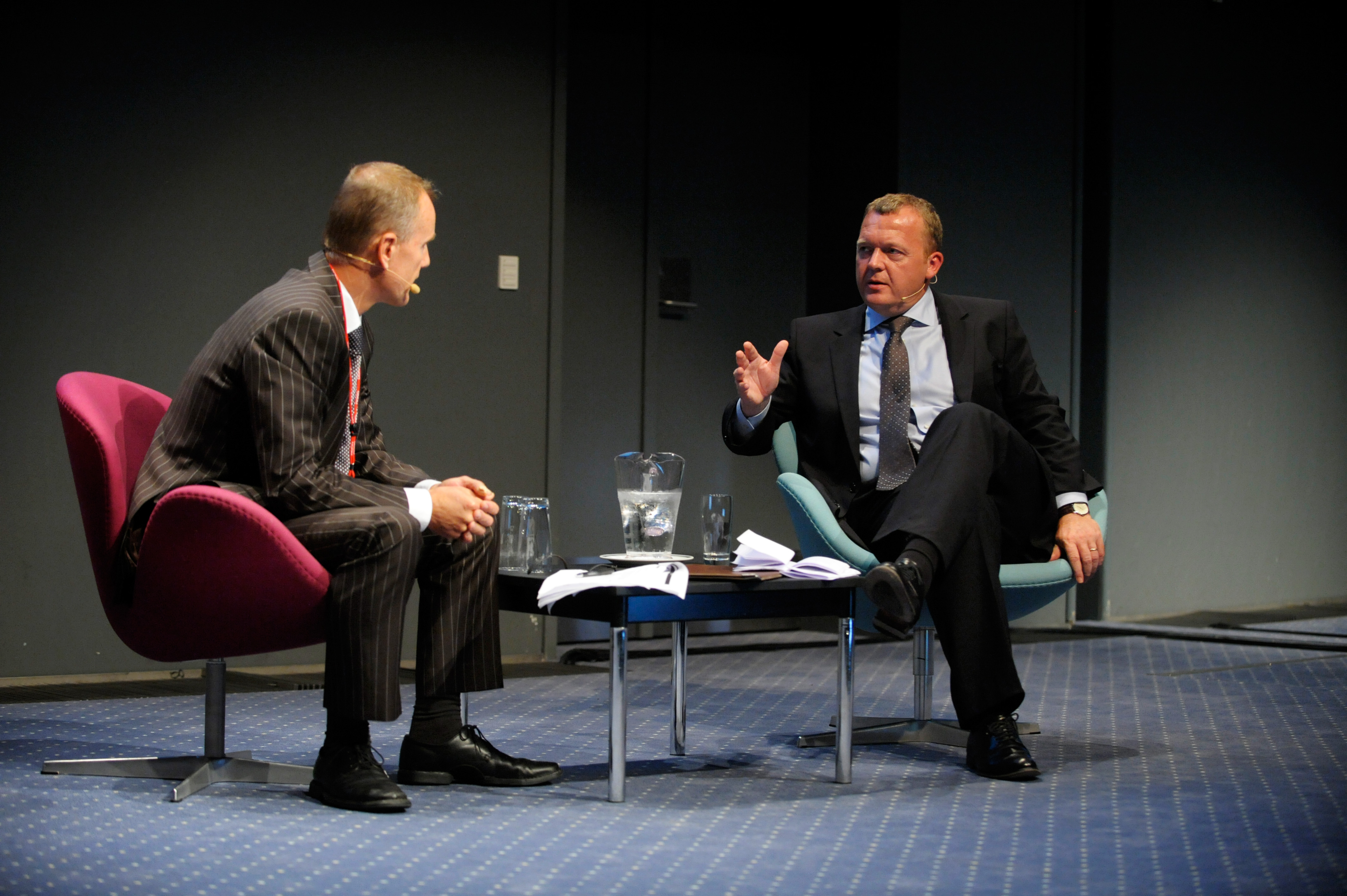 Lars Løkke Rasmussen, statsminister Danmark, samtalar med Martin Breum, journalist, vid öppnandet av Nordic Climate Solutions 2009. 2009-09-08